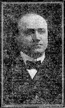 Modest Altschuler, 1905